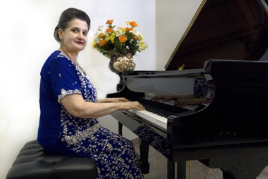 pianoforte crudeli